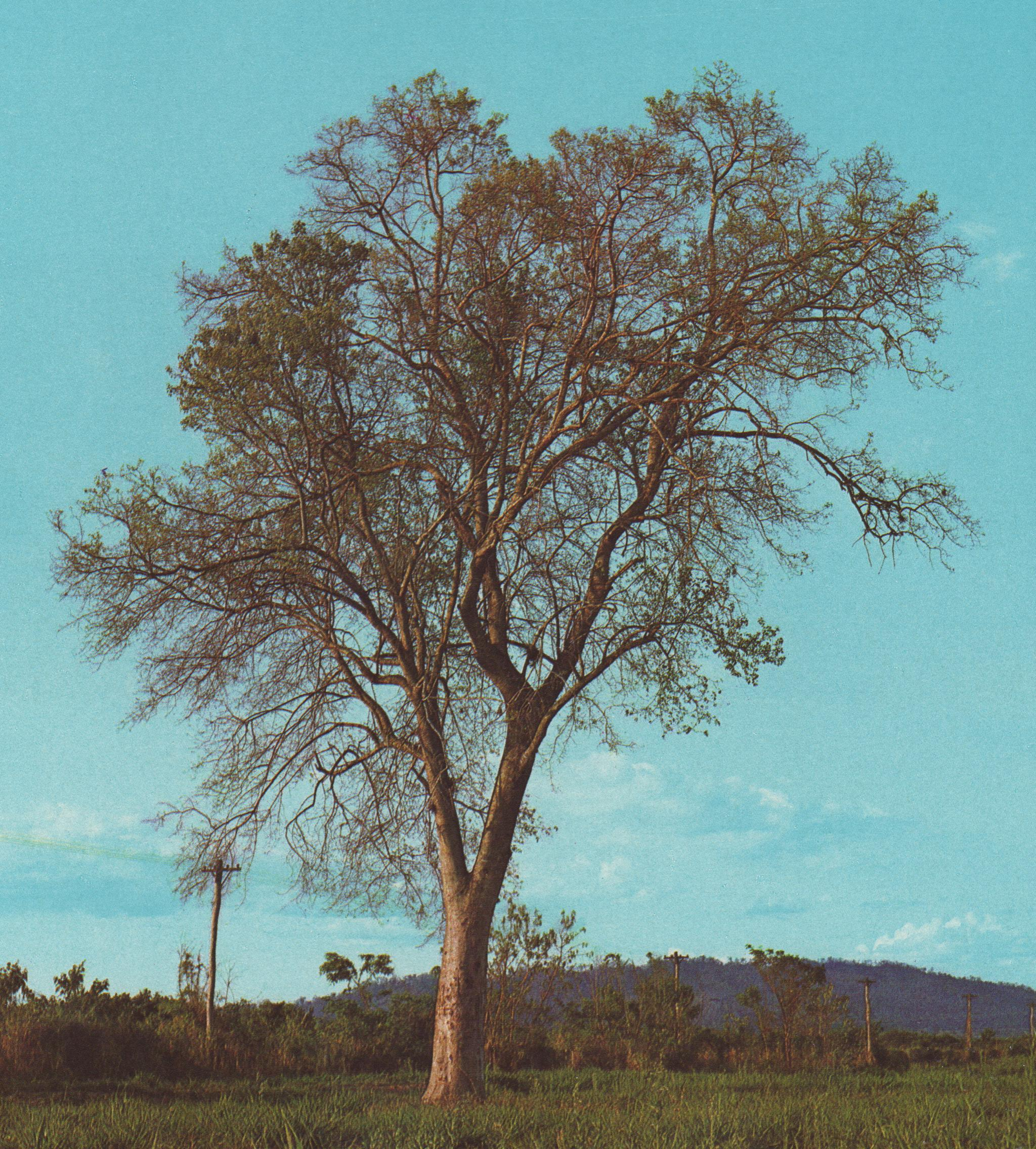 Ejemplar de Pisonia ambigua, en Argentina.